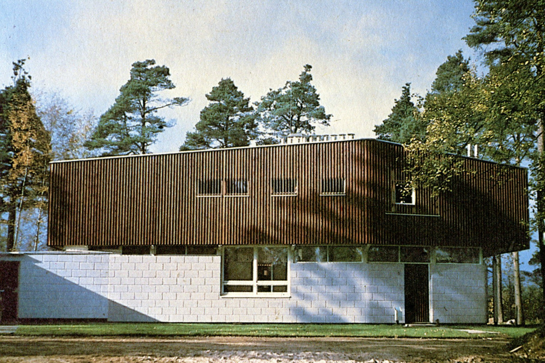 Villa Tesdorpf, arkitekt Ralph Erskine